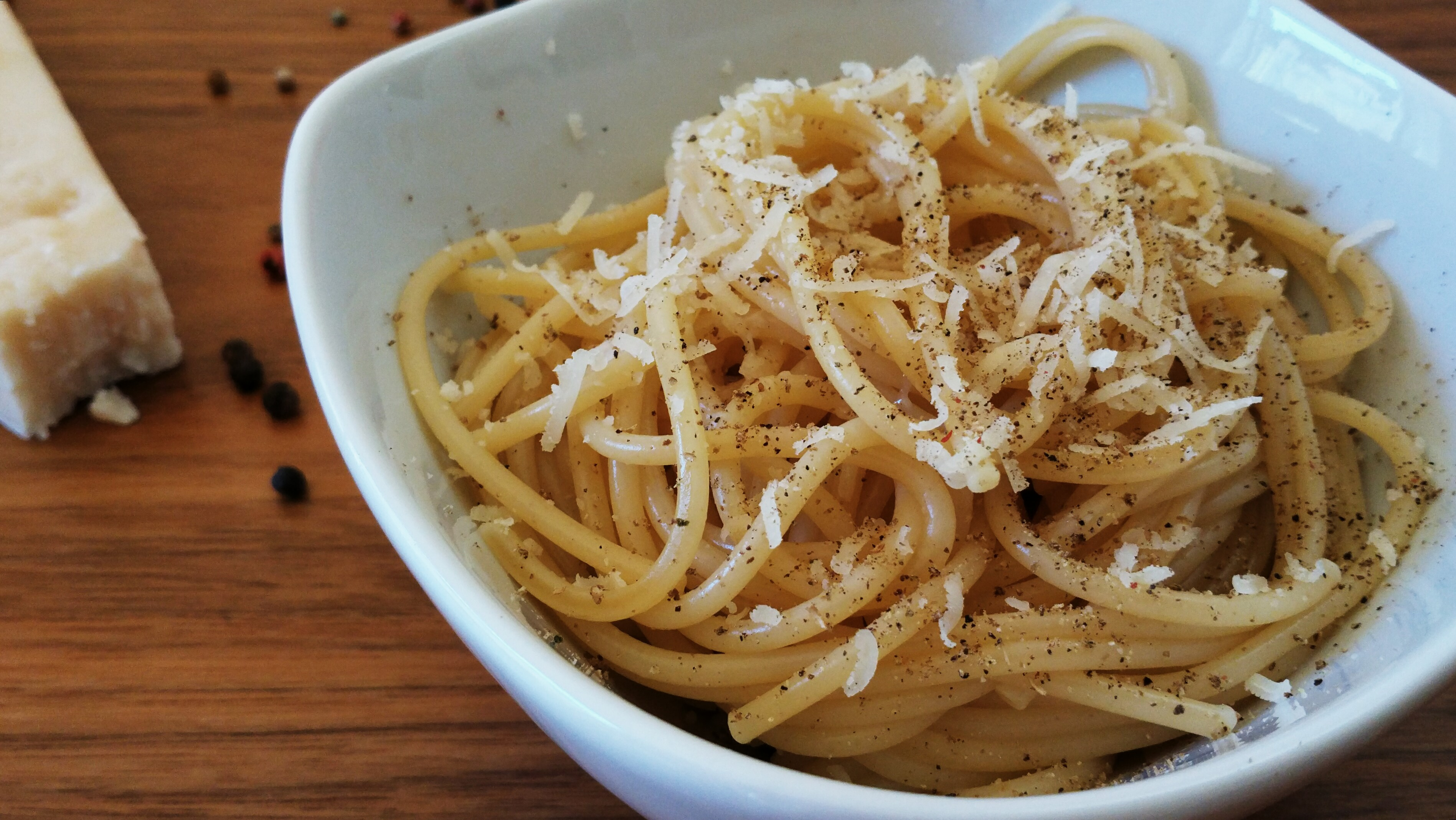 pasta cacio e pepe (cheese and pepper)